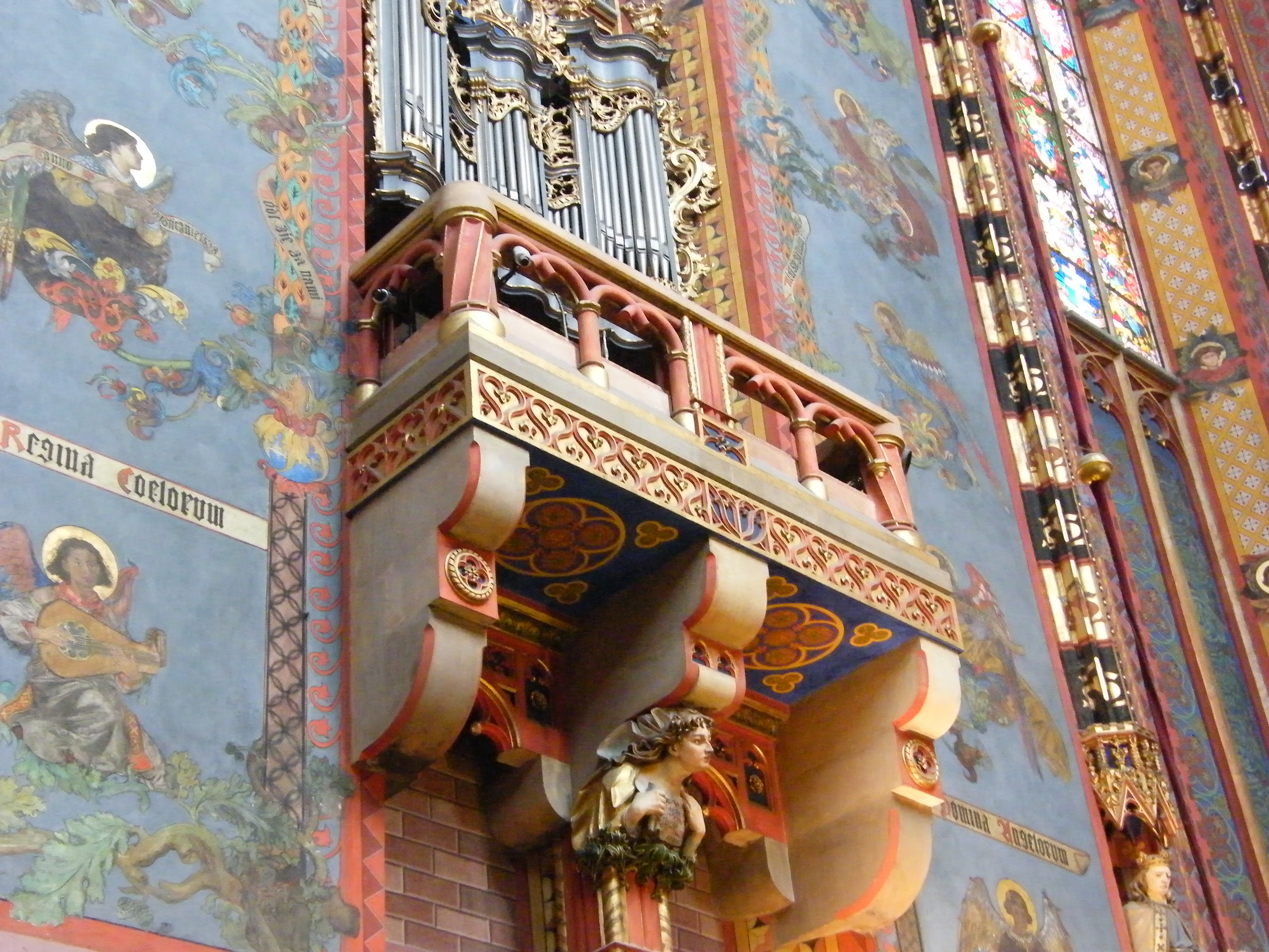 interno Basilika Mariacka-Piazza centrale medioevale " Rynek Glòwny"